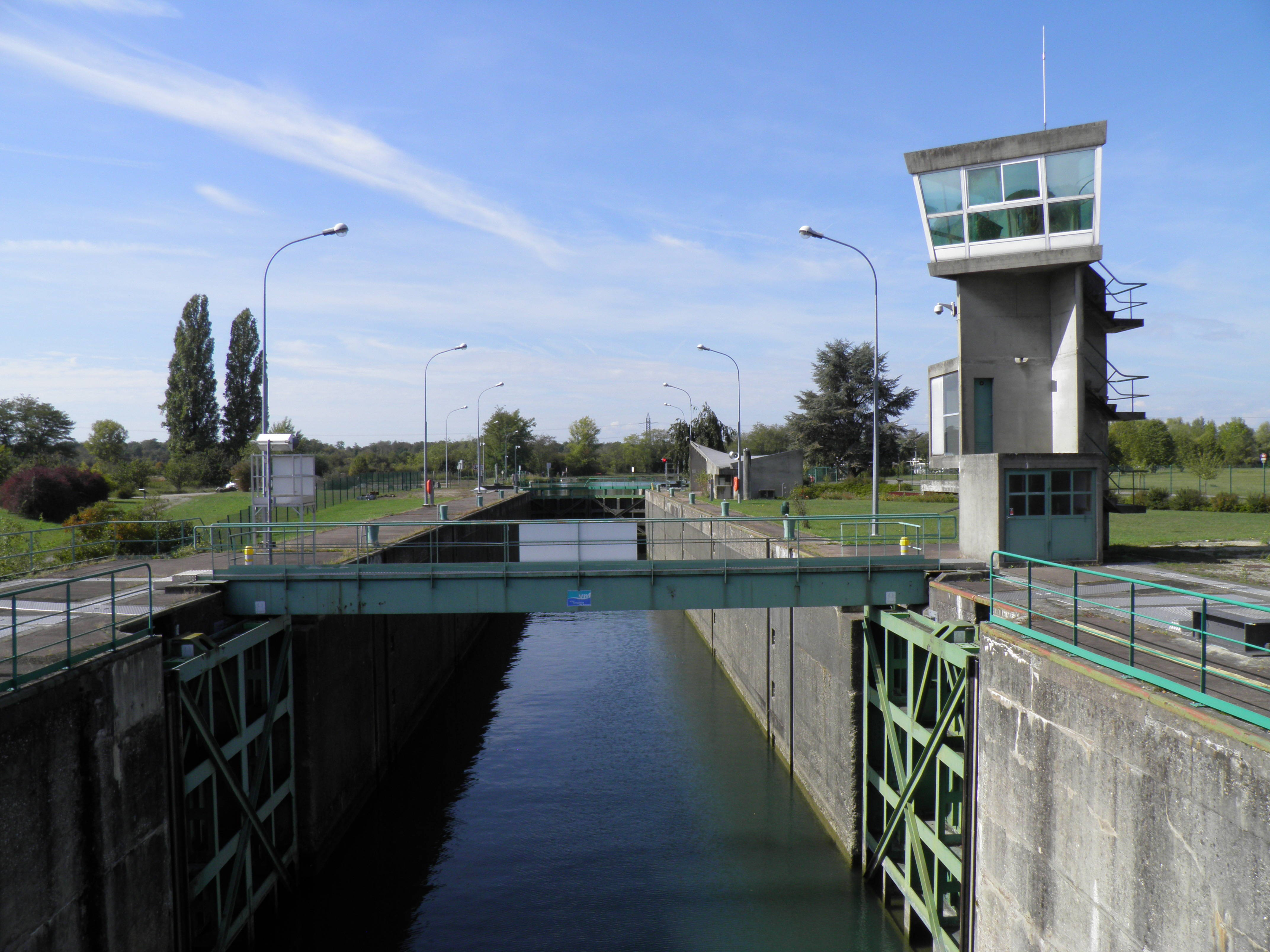 Écluse de Kembs-Niffer à Kembs (Haut-Rhin, France).